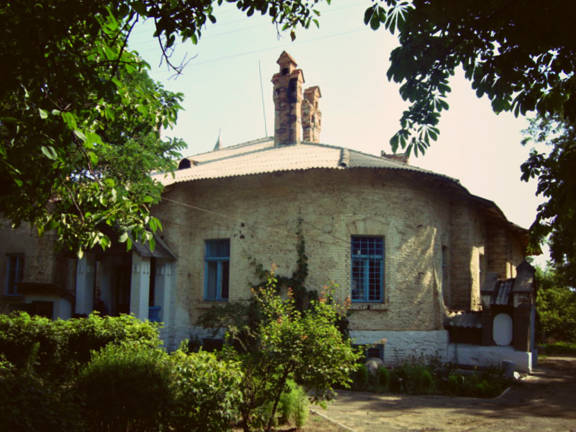 Садиба Ансельм в с. Шабо